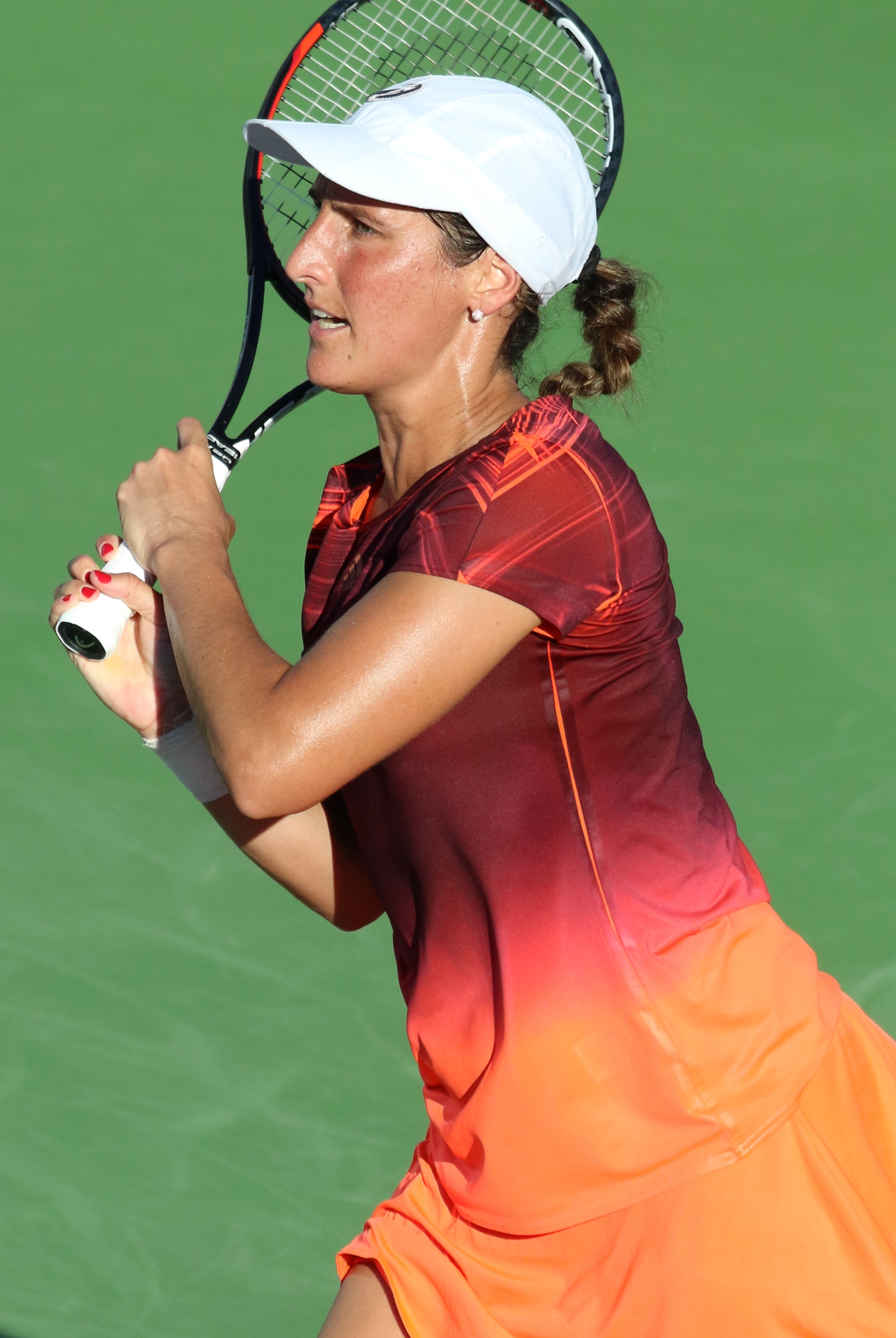 Razzano US16 (9)